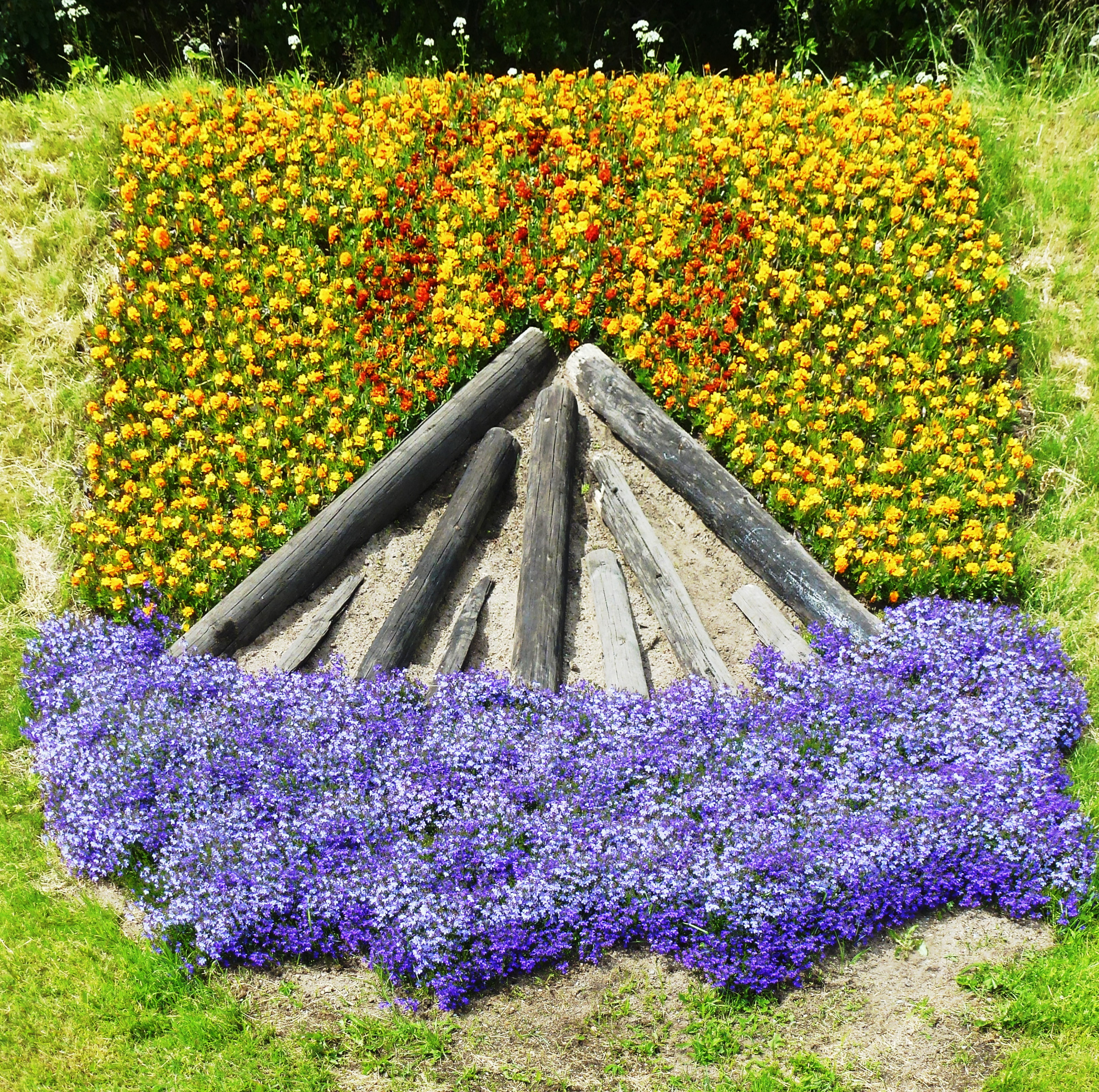 Huddinge kommunvapen som rabatt